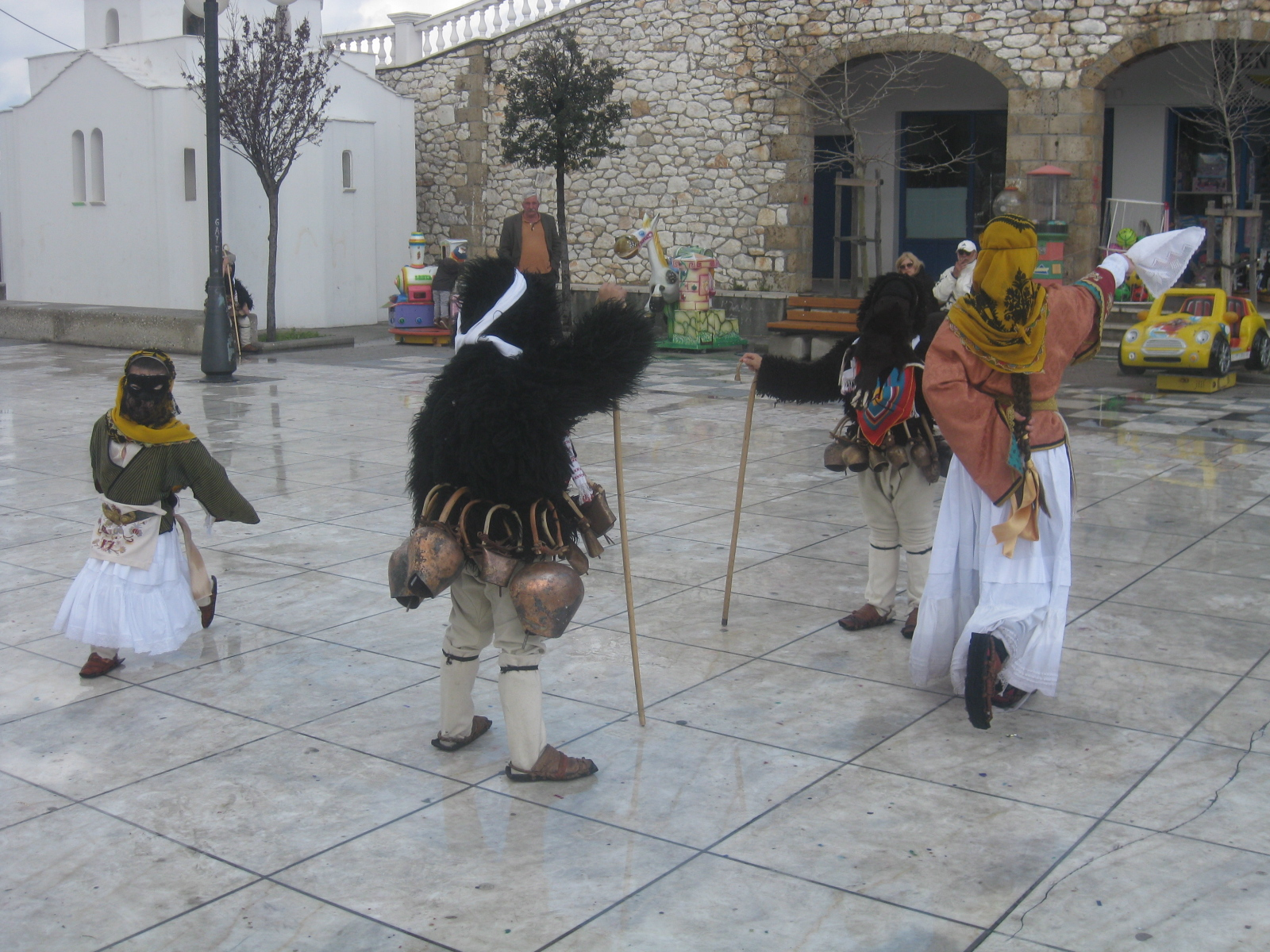 Déguisements traditionnels du carnaval de Skyros (enfants sur la place centrale).